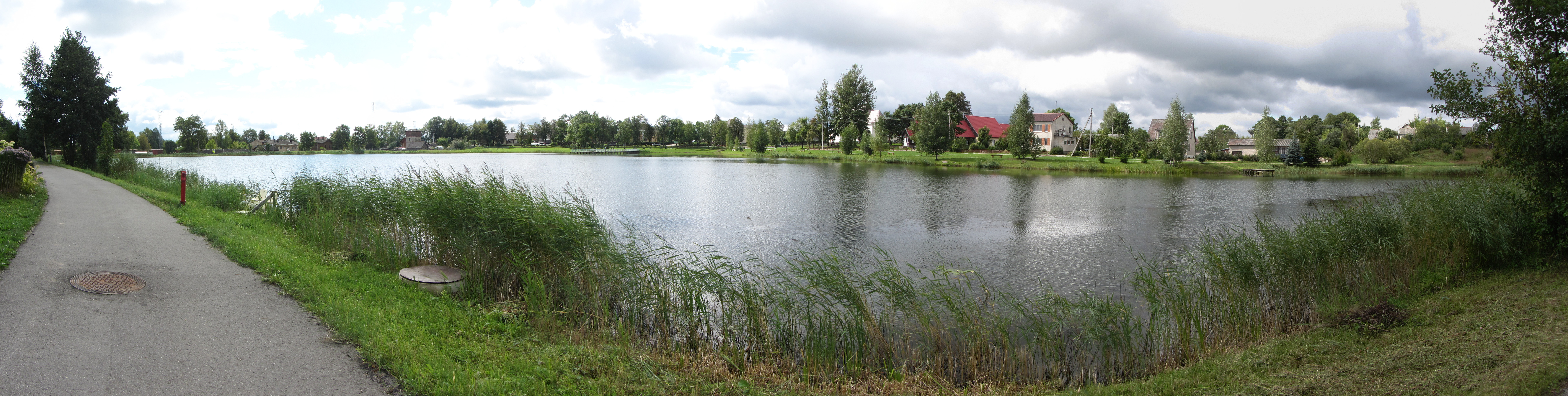 Dūkštas, Lithuania